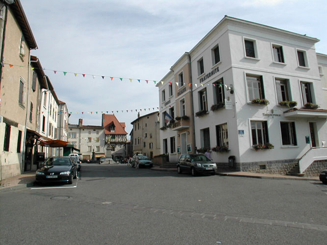 Mairie de Courpière